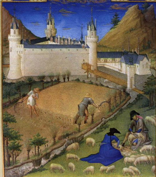 Schafschur